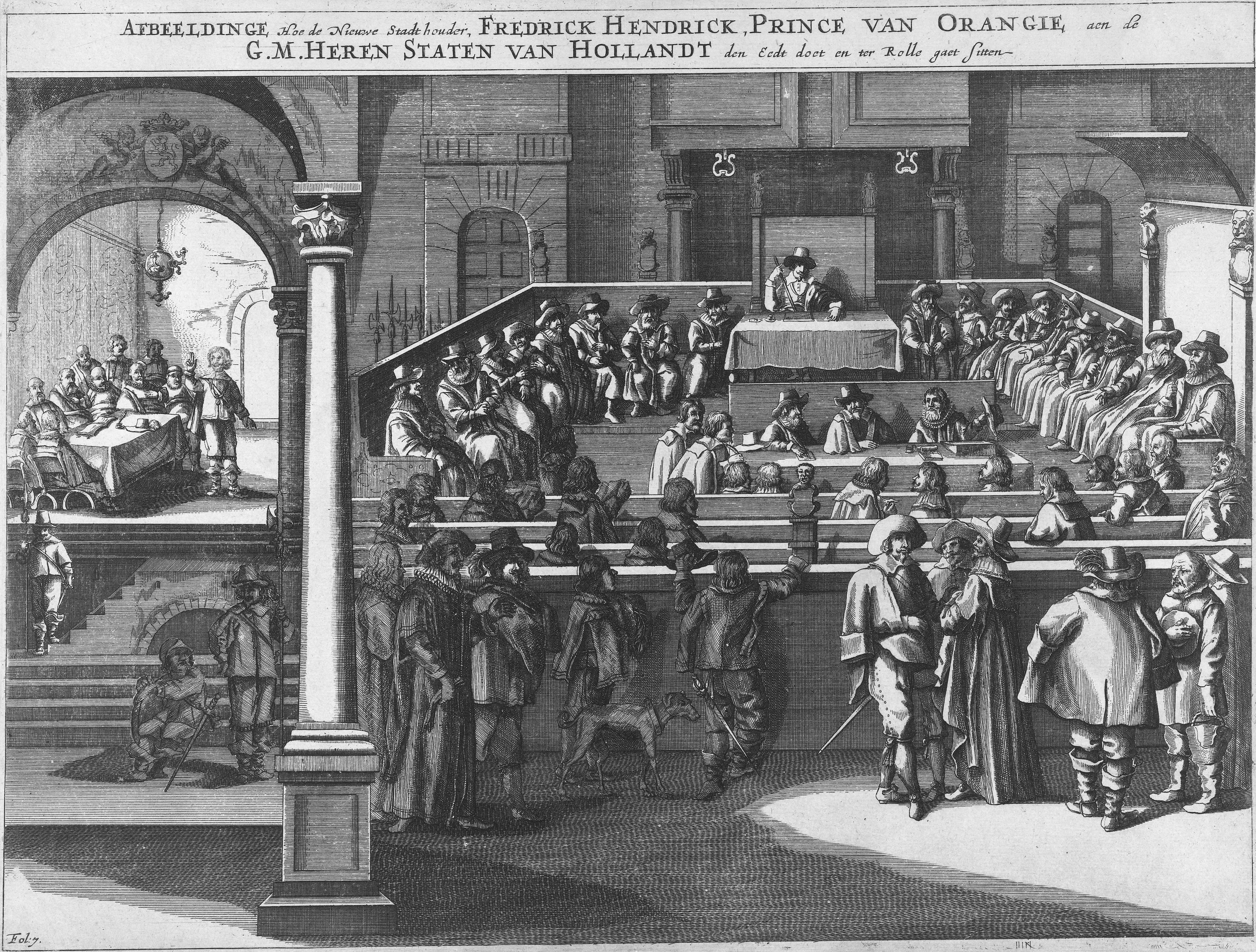 Afbeeldinge, Hoe de Nieuwe Stadt houder, Fredrick Hendrick, Prince van Orangie, aen de G.M. Heren Staten van Hollandt den Eedt doet en ter Rolle gaet sitten Frederik Hendrik legt de eed af als stadhouder en neemt zitting in de Staten van Holland, 1625